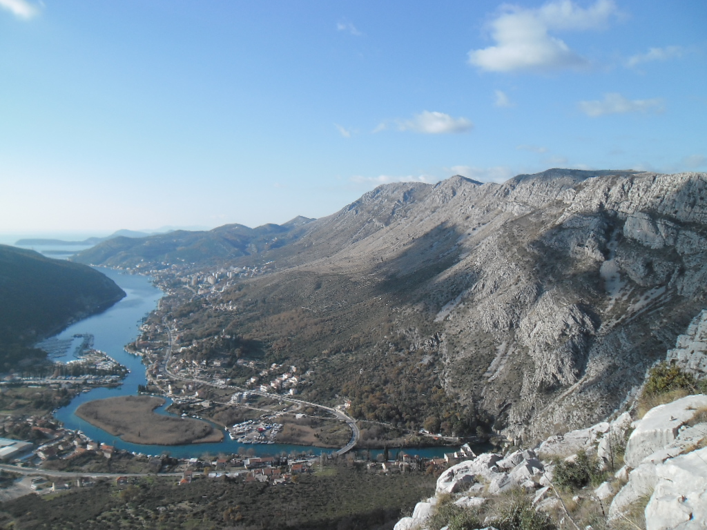 pogled s Golubova kamena na Rijeku dubrovačku